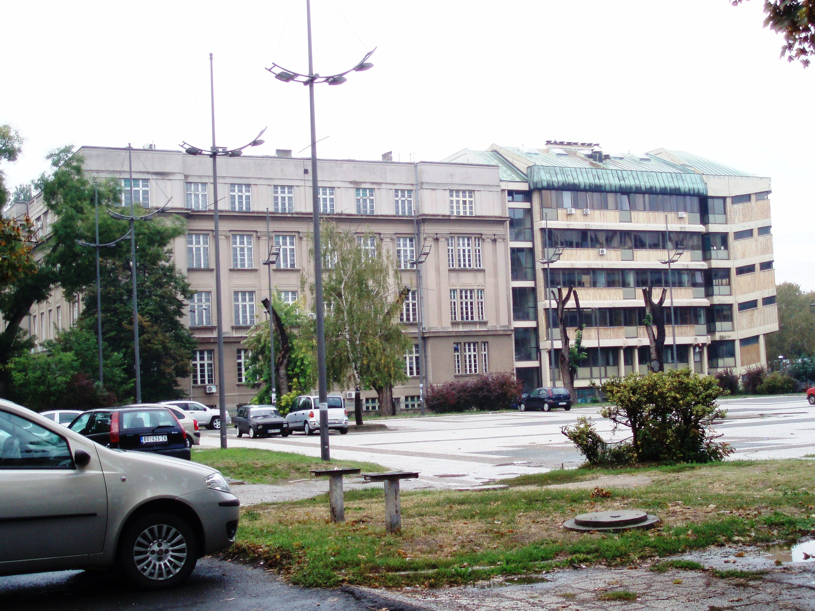 Fotografija Poljoprivrednog fakulteta u Zemunu, pogled iz parka, Autor:Nicolo